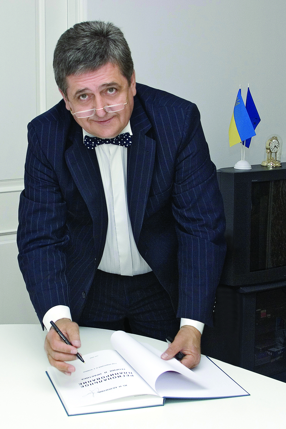 Юрій Миколайович Білоконь, директор ДП УДНДІПМ "Діпромісто" імені Ю.М.Білоконя в 1993-2009 роках, Народний архітектор України